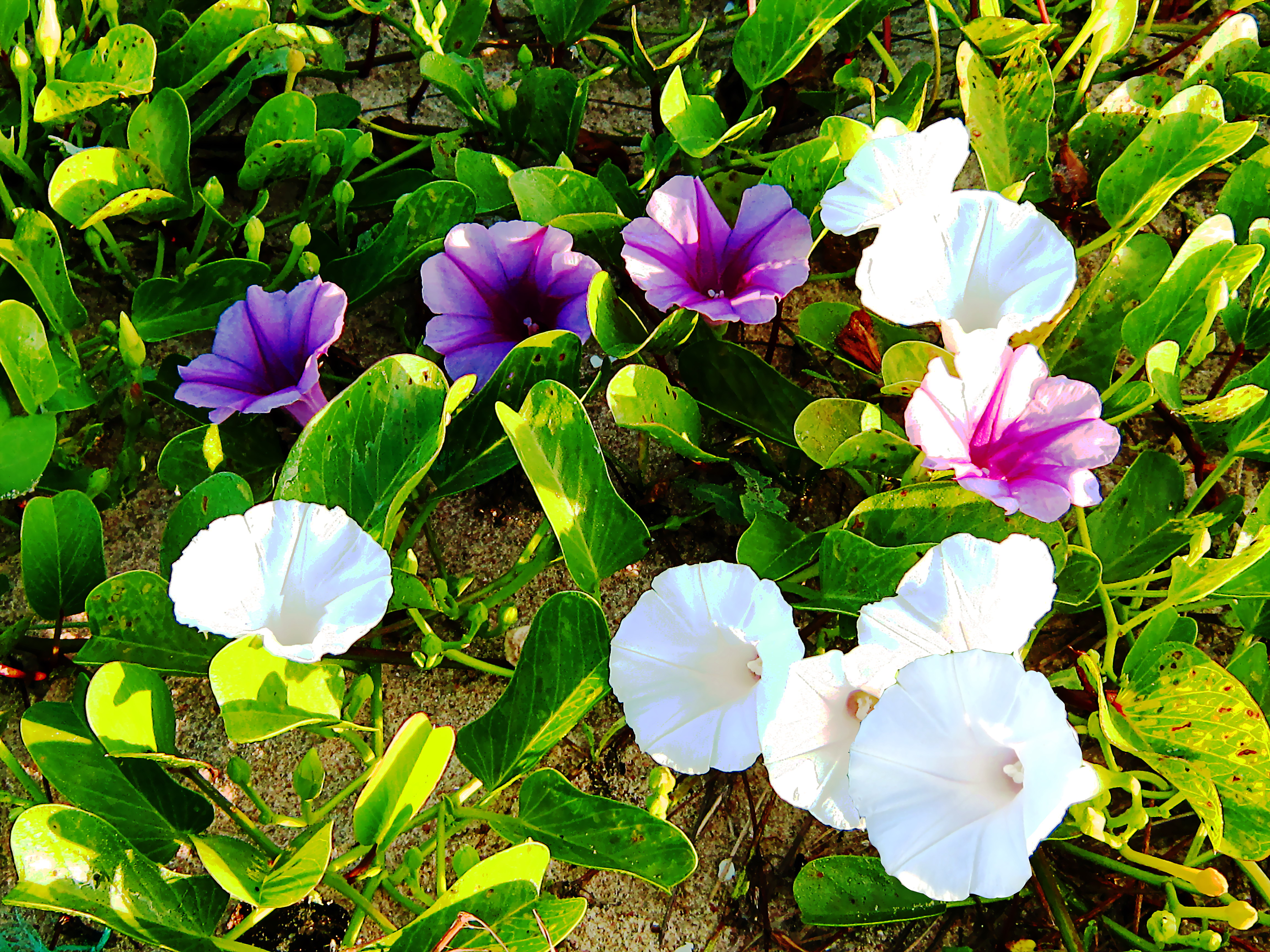 Rau muống biển trổ hoa trắng và tím ở bờ biển Xuyên Mộc, thuộc tỉnh Bà Rịa-Vũng Tàu, Việt Nam.